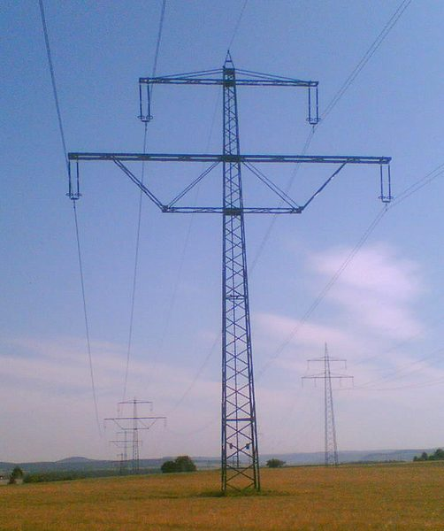 C1-Mast Nähe Schaltanlage Hoheneck